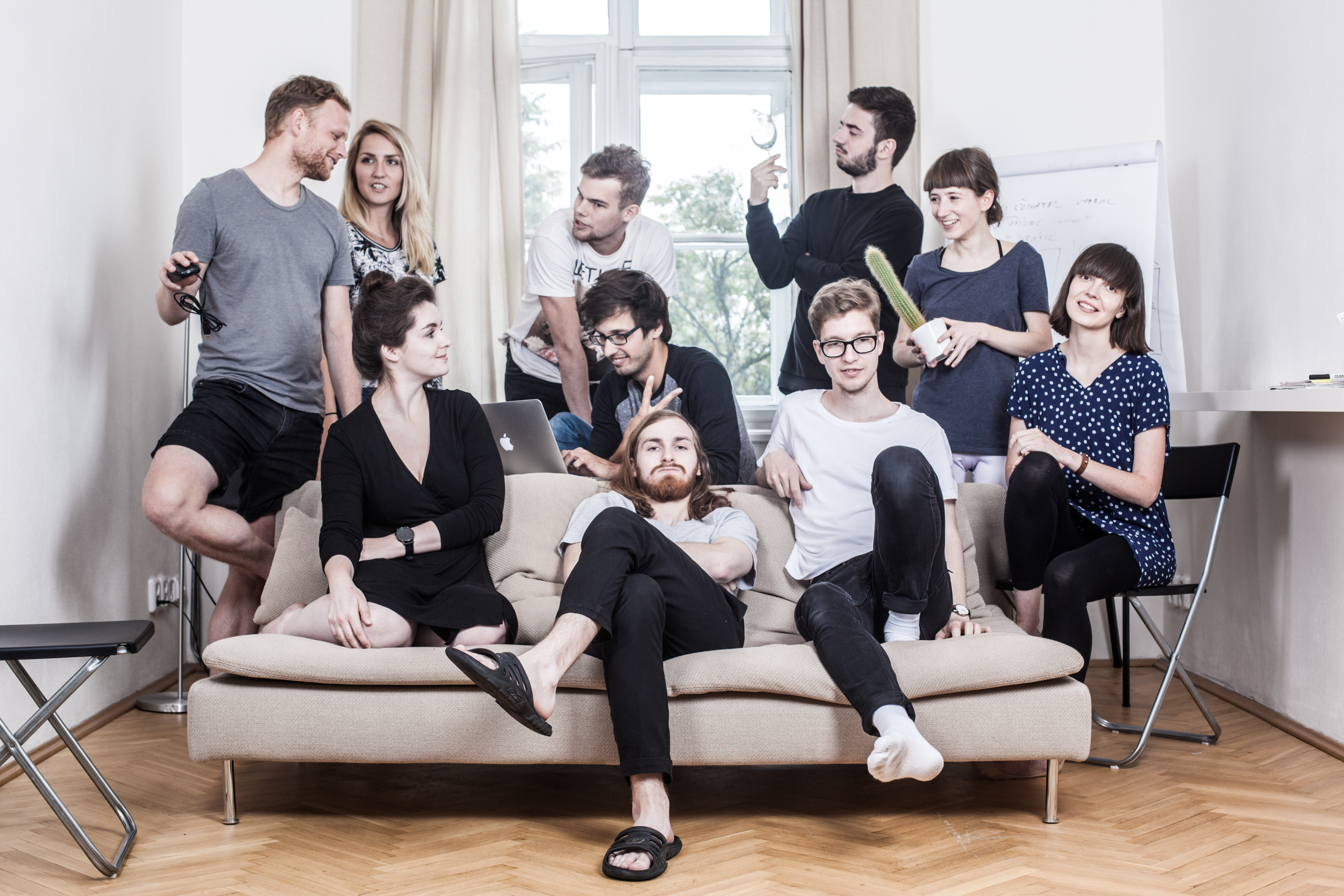 Tým GoOut.cz